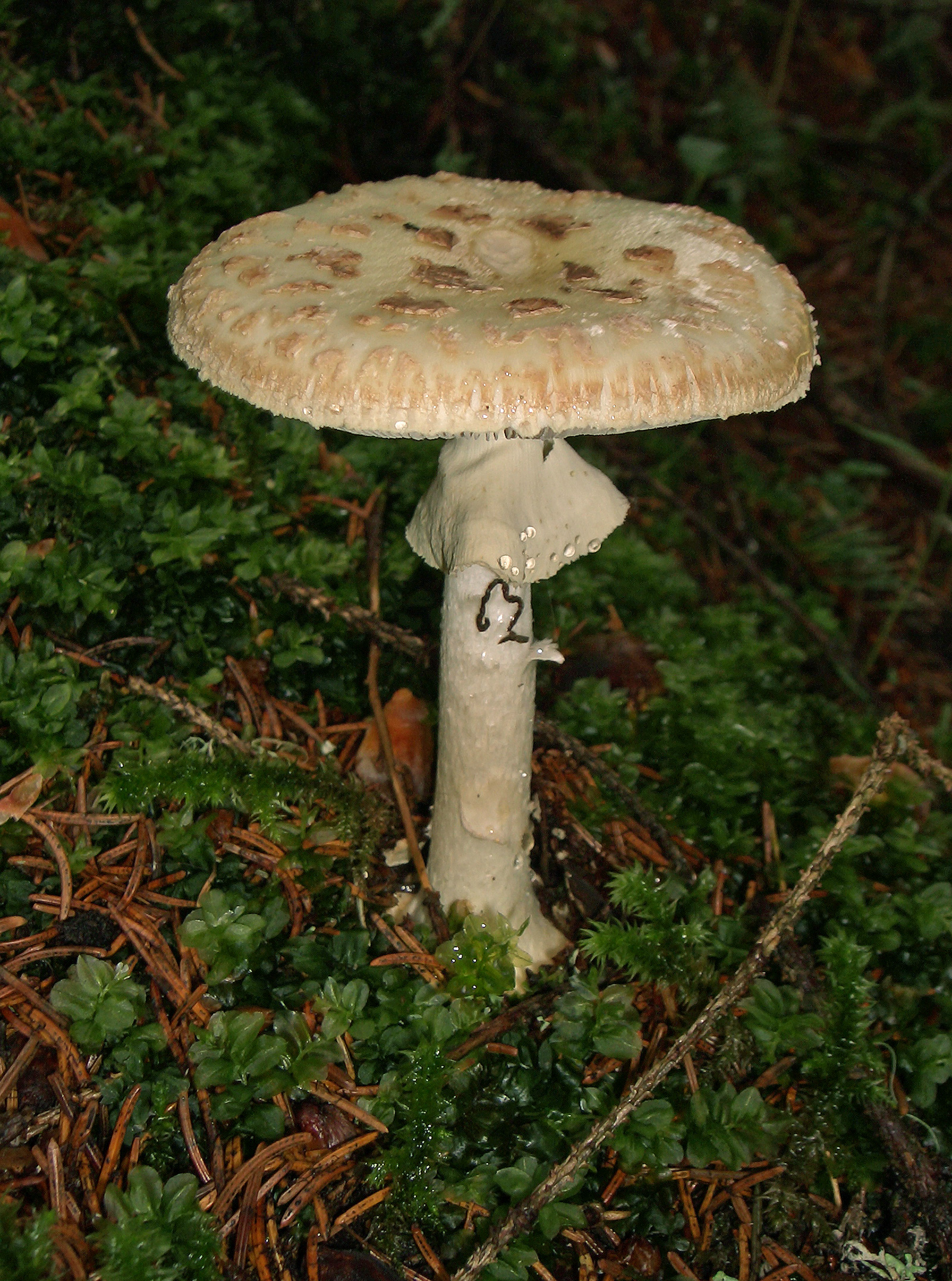 Amanita citrina - foto personale, B.Baldassari - Bellamonte (TN), Italy - Agosto 2006